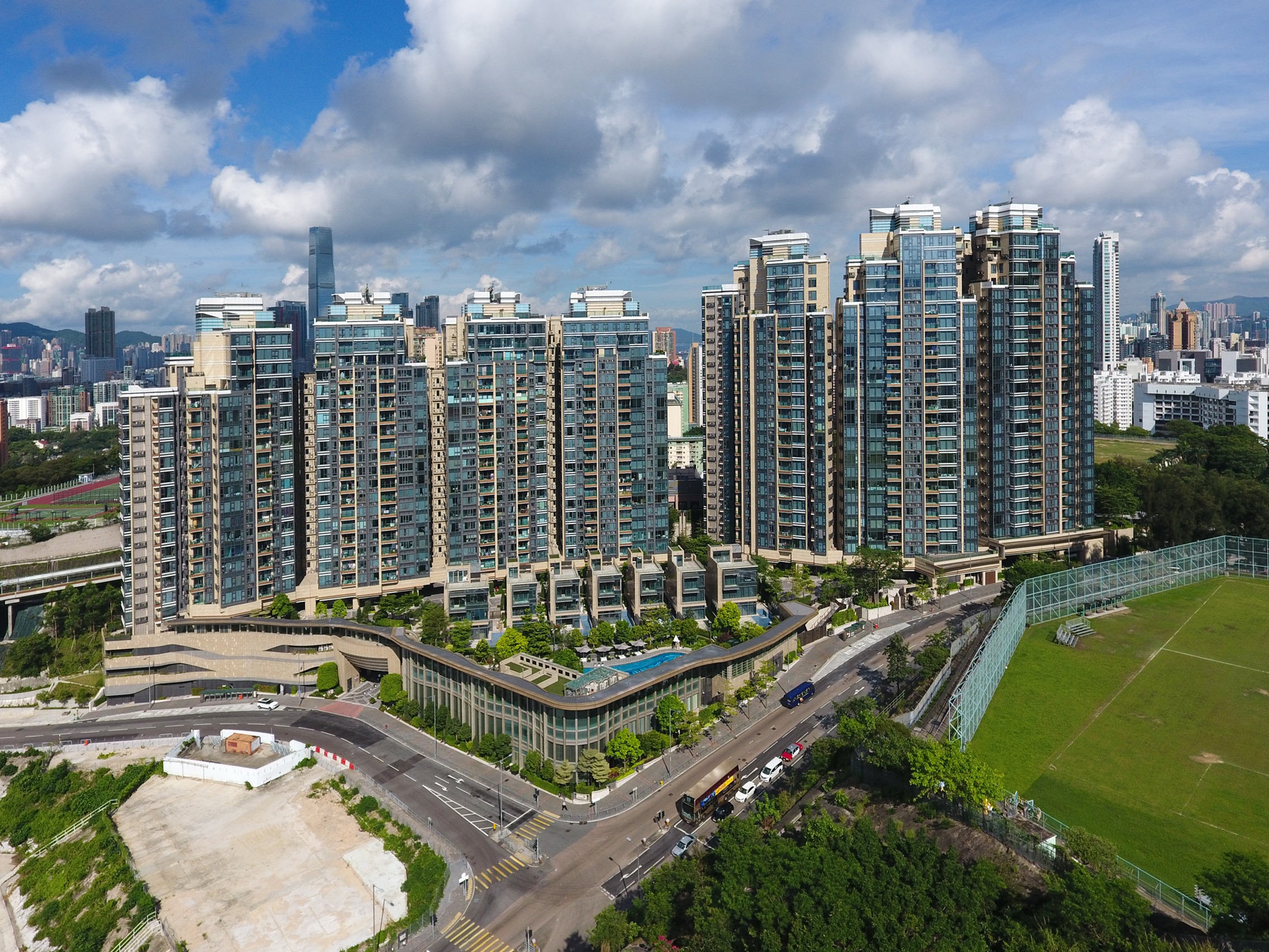 Ultima